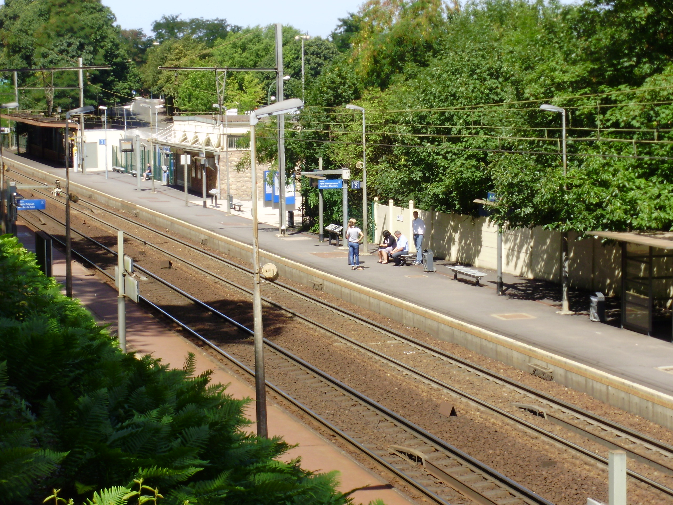 Gare de Fontenay-le-Fleury, Yvelines, France : quai pour Paris-Montparnasse depuis le chemin de la chapelle Saint-Jean au sud des voies